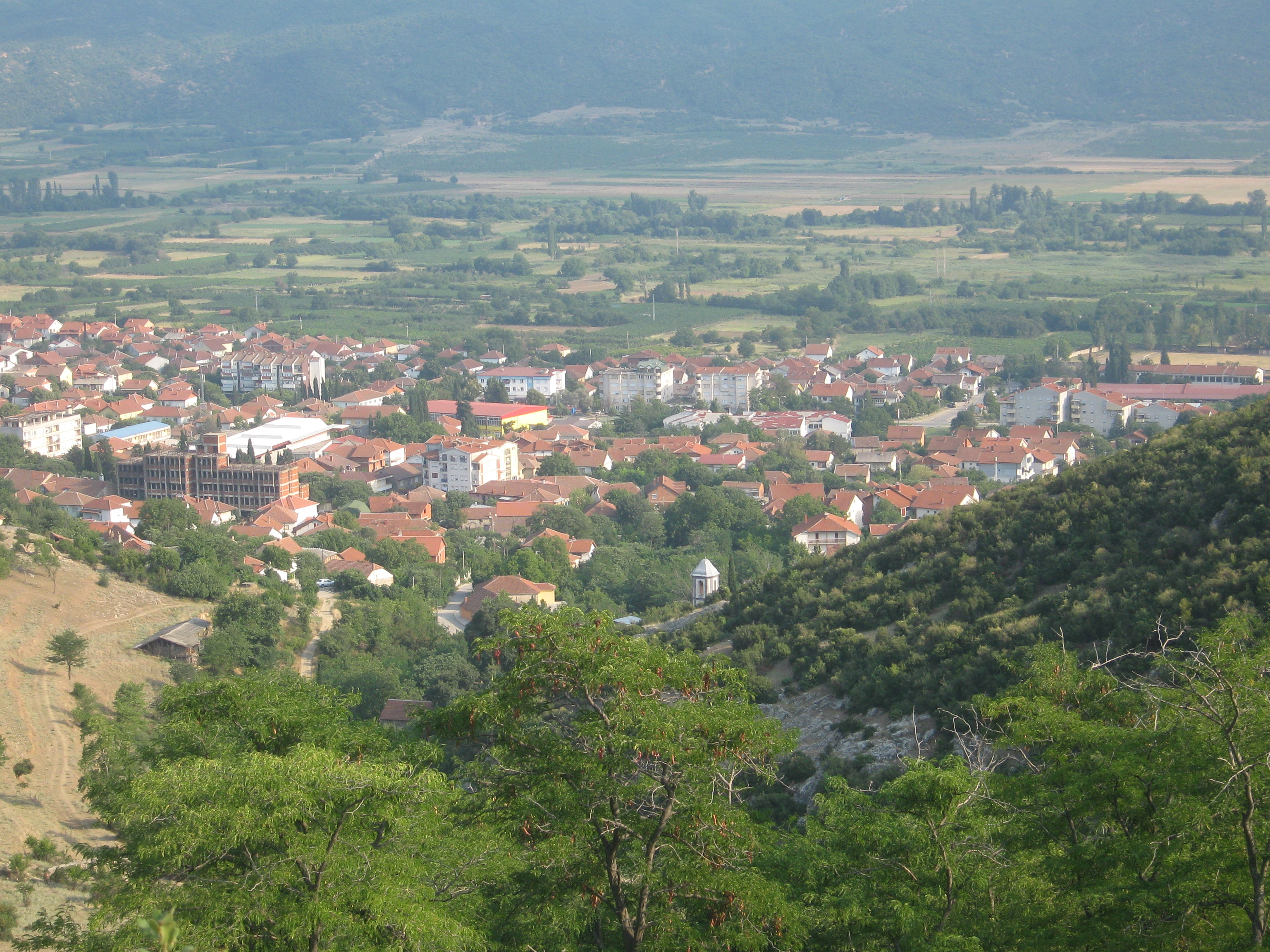 Valandovo